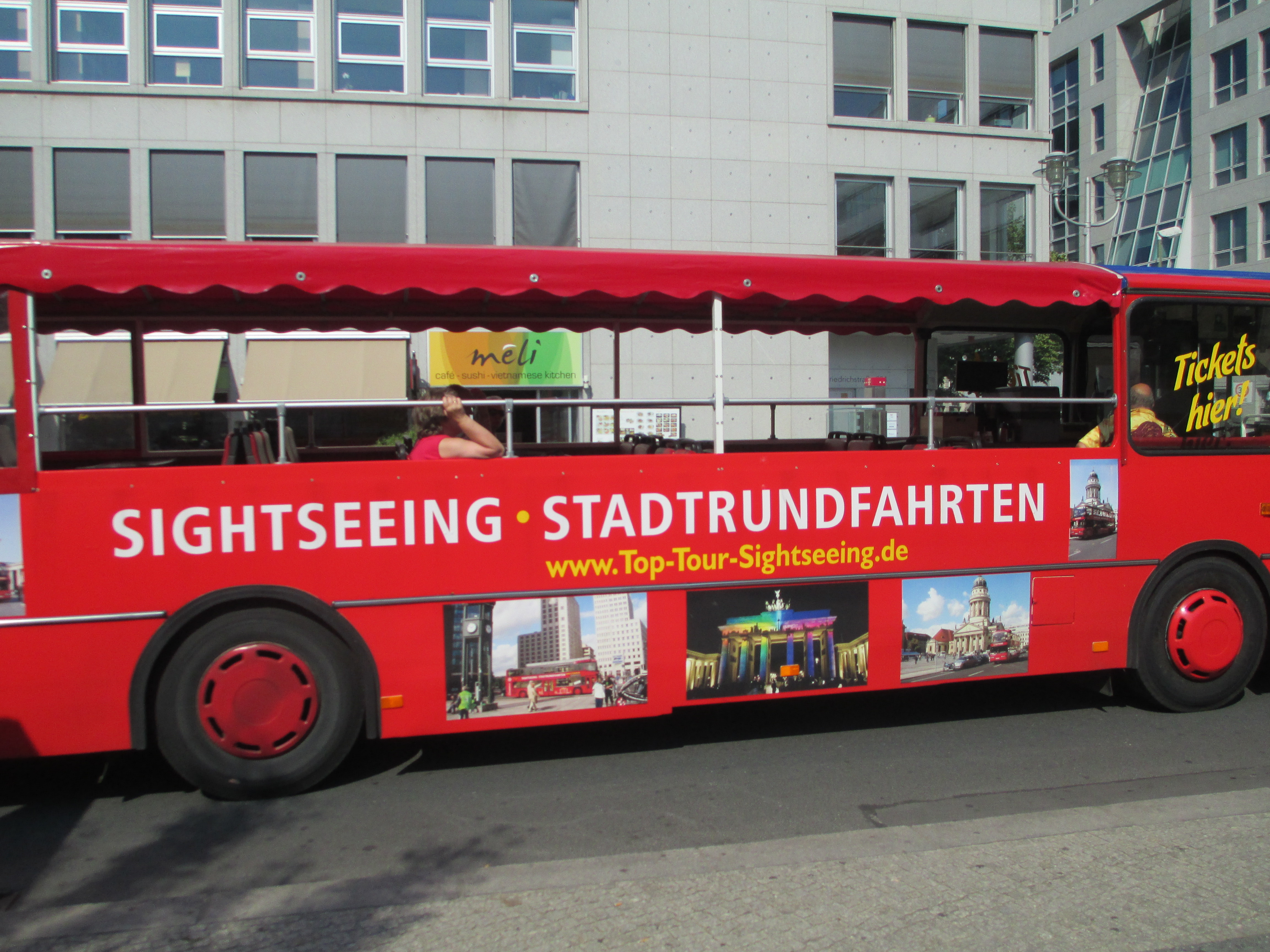 אוטובוס תיור בברלין